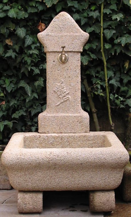 Fontana formata da colonna con altorilievo, vasca e due basamenti, ricavata completamente a mano, spuntata e bocciardata. Il tubo del rubinetto è passante sulla colonna. E' provvista di scarico con "Piletta" ottonata come il rubinetto.